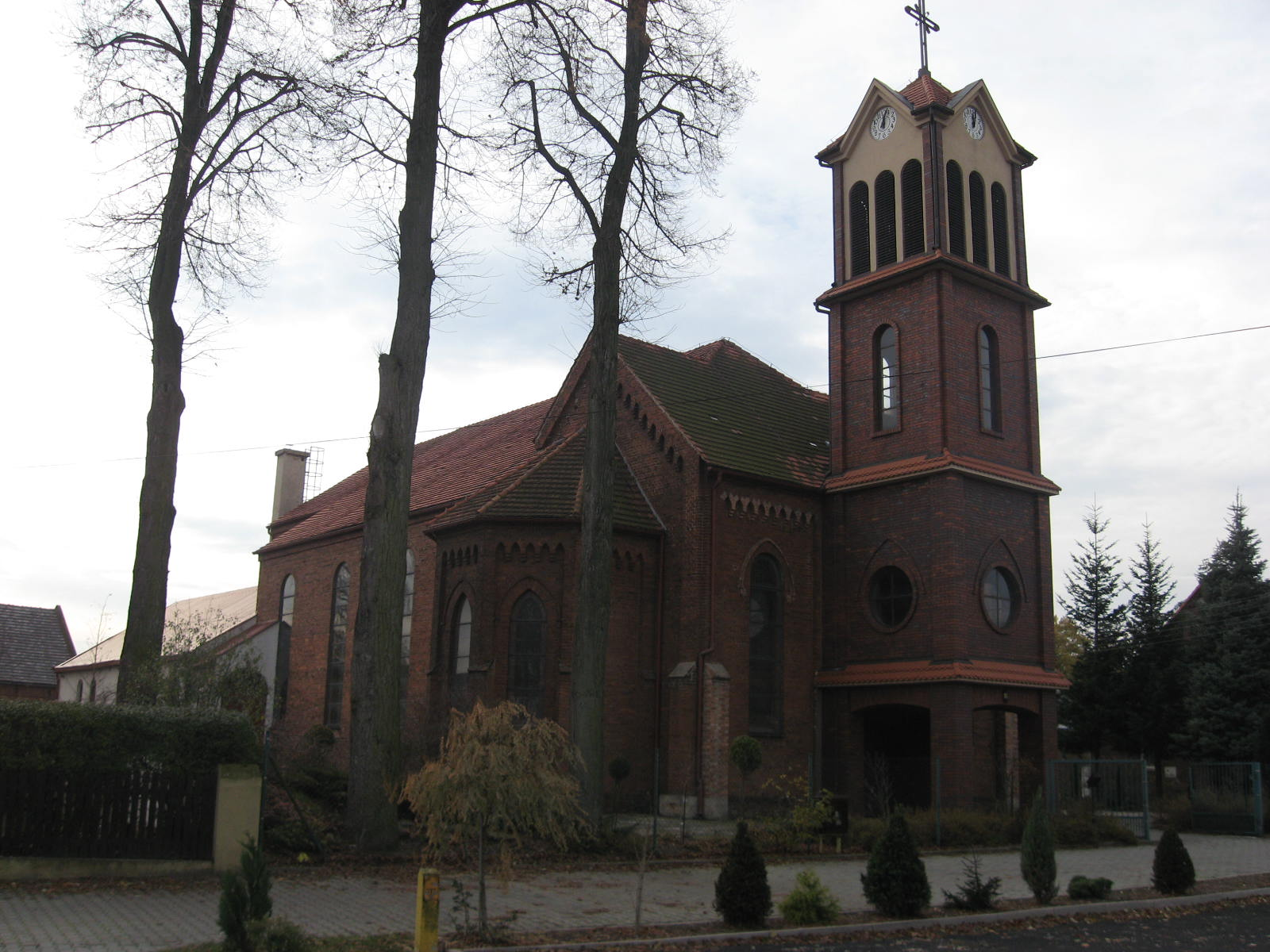 Widok ogólny kościoła